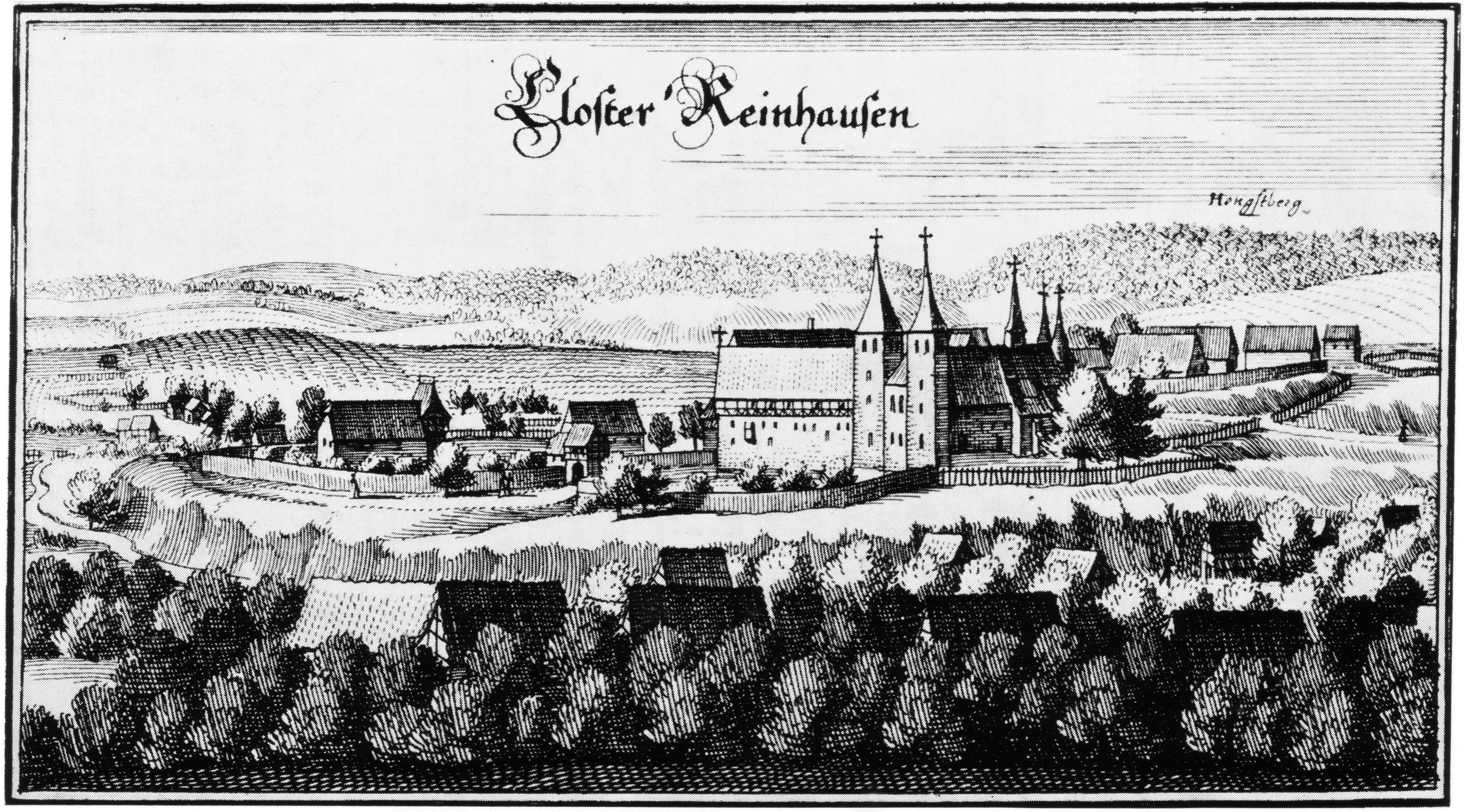 Ansicht der Klosteranlage in Reinhausen von Südwesten, Merian-Stich um 1650 in der Topographia Germaniae, Bd. 15